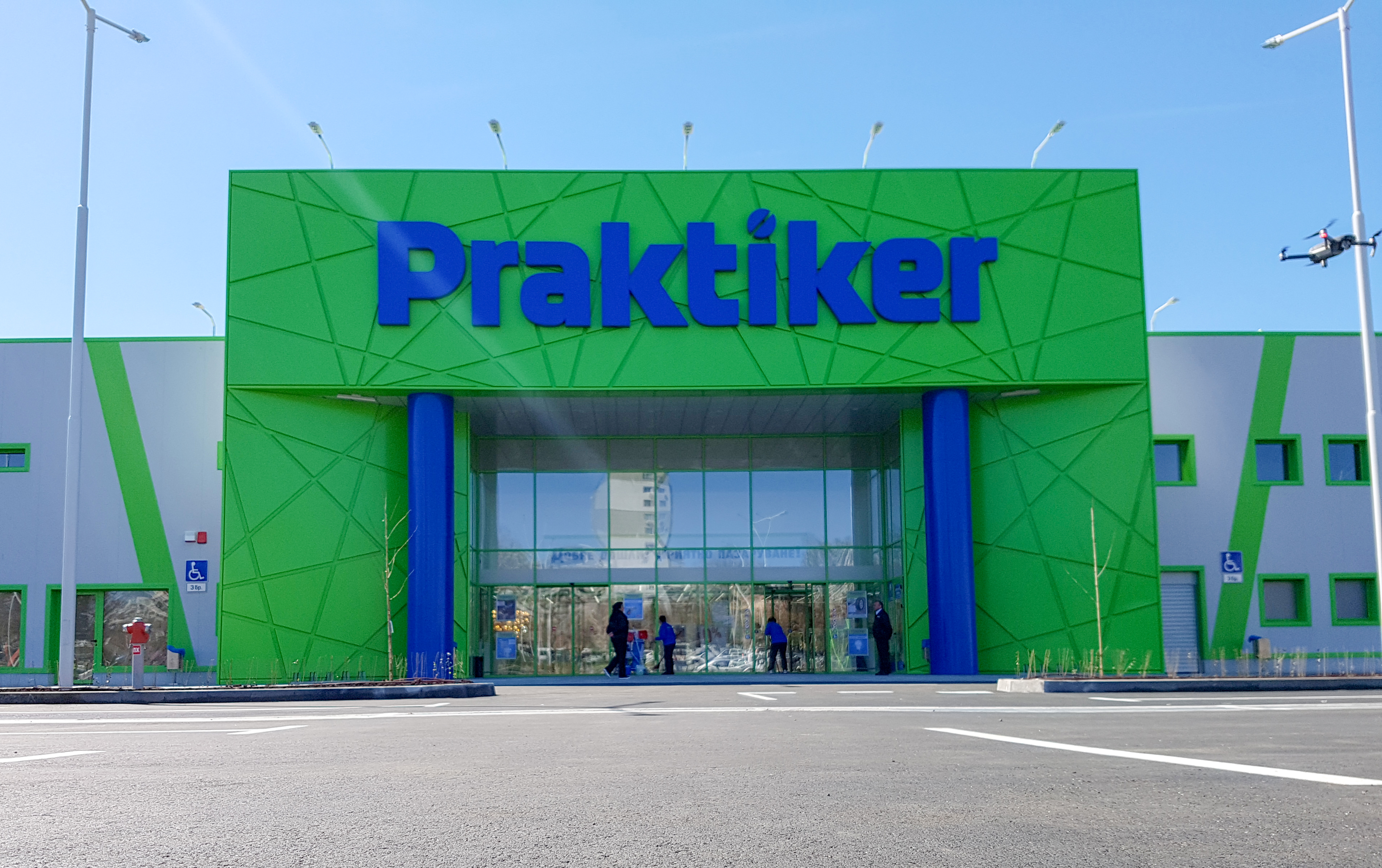 Практикер Бургас след обновяването